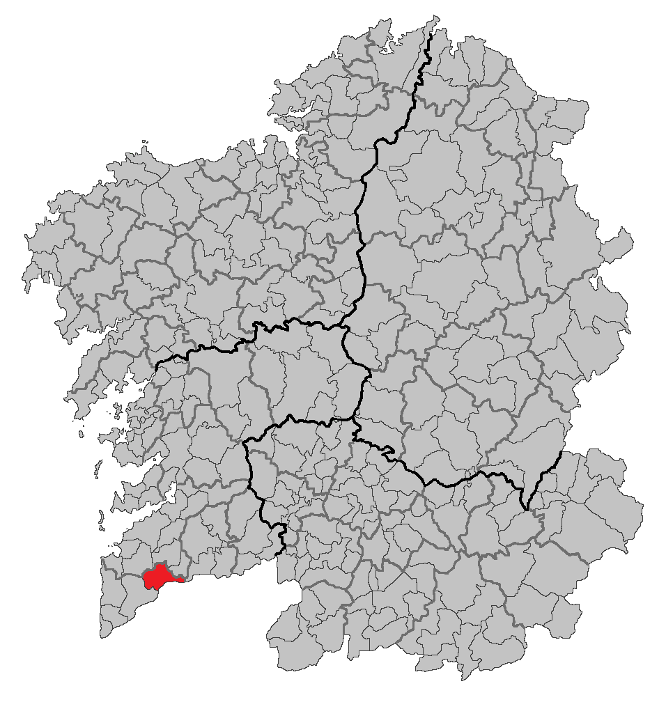 Mapa coa localización do concello de Tui.